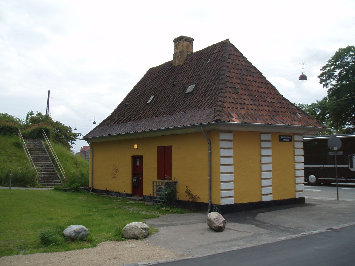 Acciseboden på Christianshavn